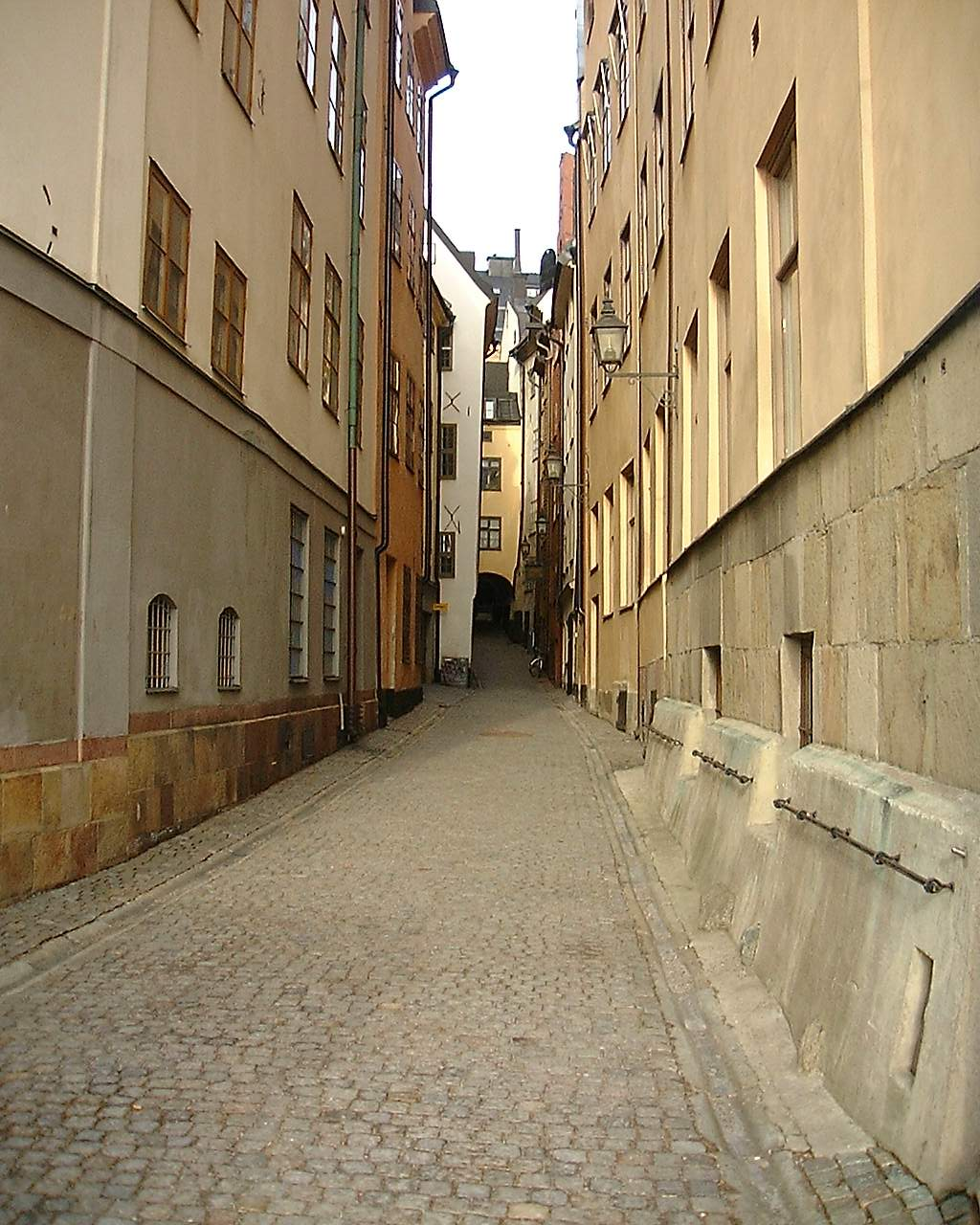 Stora Hoparegränd viewed from Skeppsbron.